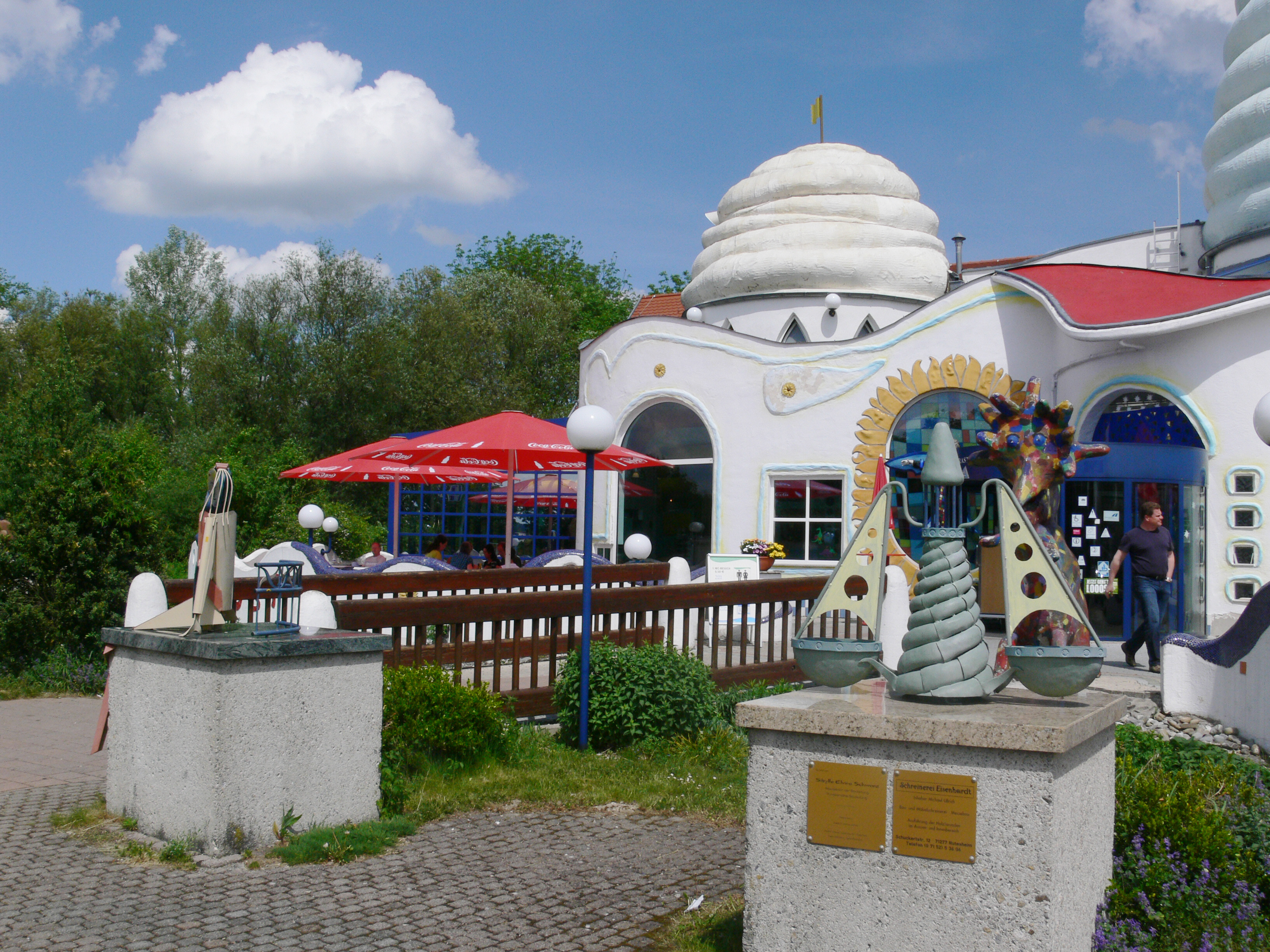 Raststätte "Illertal-Ost" an der Bundesautobahn 7, Deutschlands erste künstlerisch gestaltete Autobahnraststätte (eröffnet 1997), Dettingen an der Iller